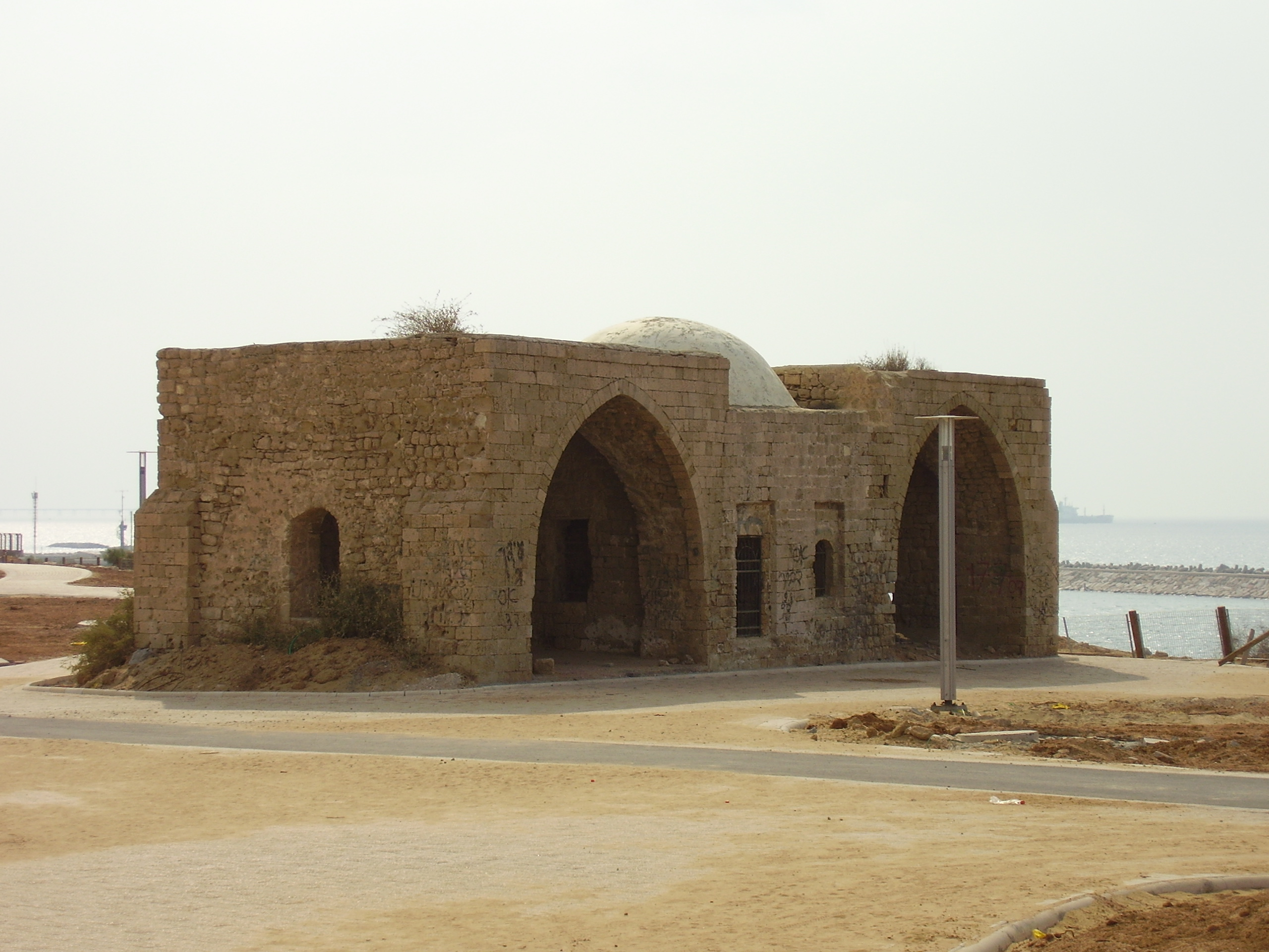 התמונה מראה את קבר השייח' עוואד, הנמצא בראש הצוק בטיילת אשקלון.